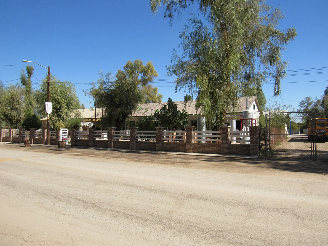 El museo del asalto a las tierras se encuentra al centro de Michoacán de Ocampo, municipio de Mexicali, Baja California